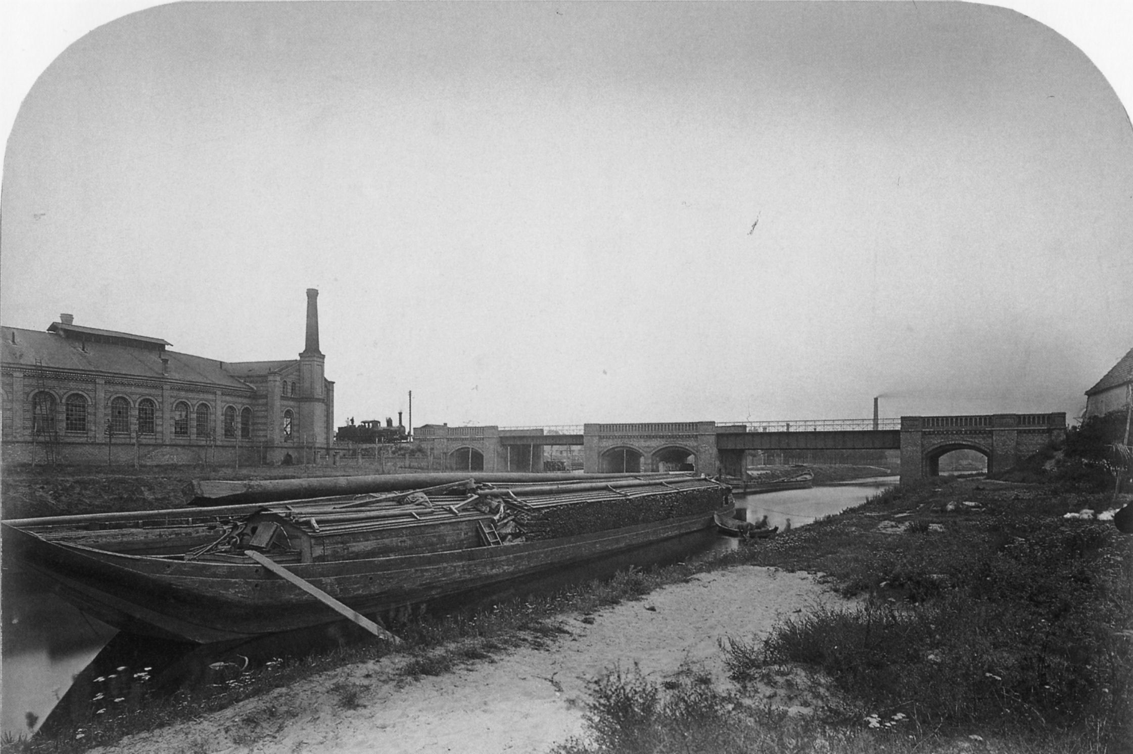 Brücke der Görlitzer Bahn über den Landwehrkanal